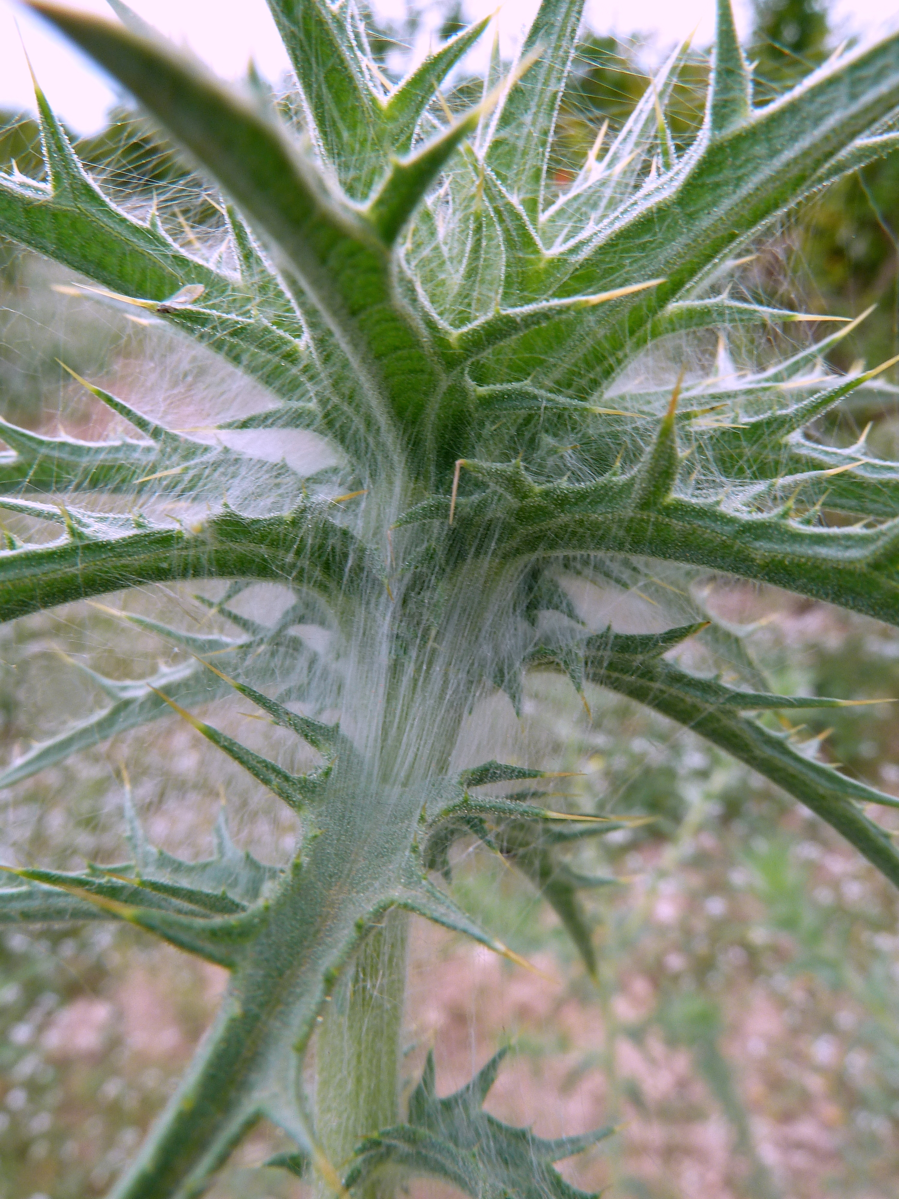 Carthamus lanatus - Detalle de la borra lanuda que daría el nombre a la especie; preantesis - Camino de Elche/Cañada de Orihuela, Albatera (Alicante, España)